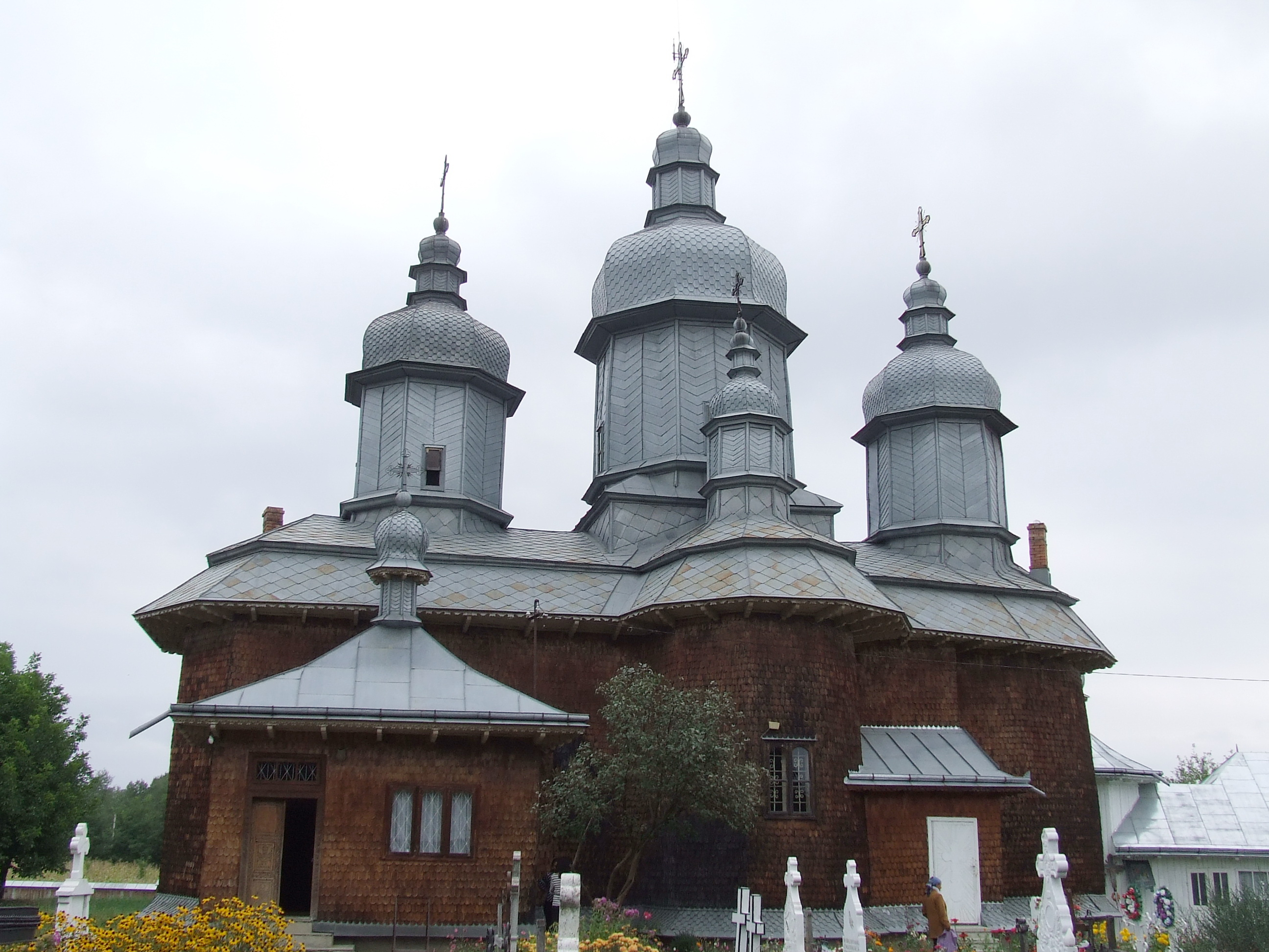 Biserica de lemn din Topoliţa, judeţul Neamţ.